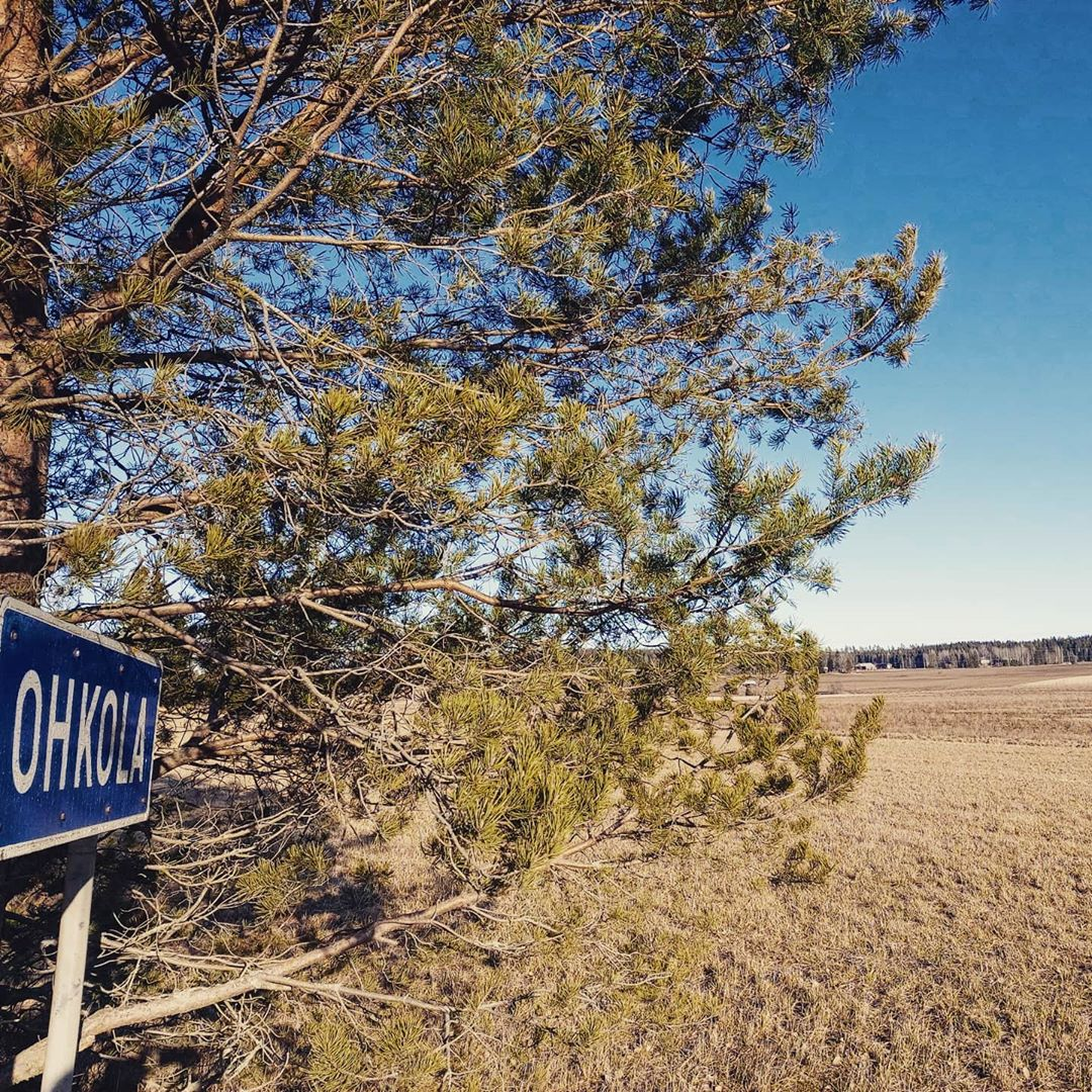 Ohkolan maalaismaisemaa ja opastekyltti.